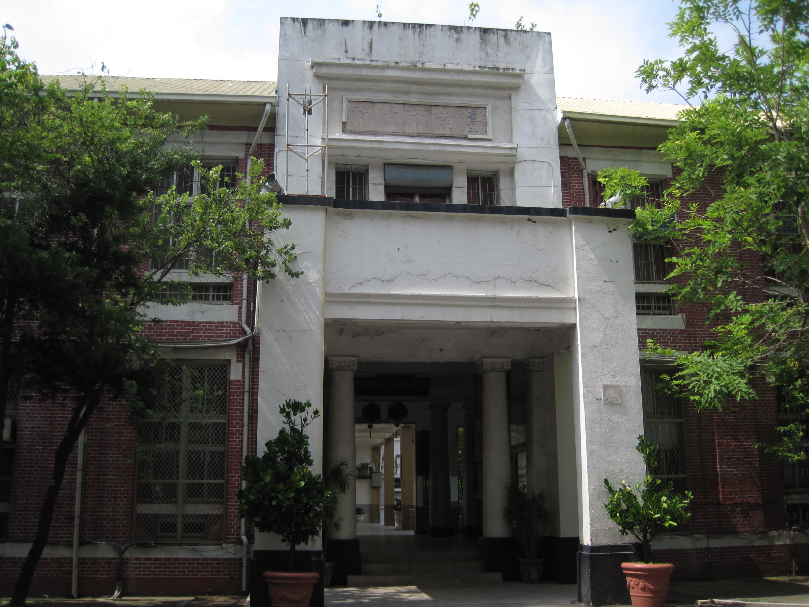 臺南市原南門尋常小學校舍，今之建興國中。